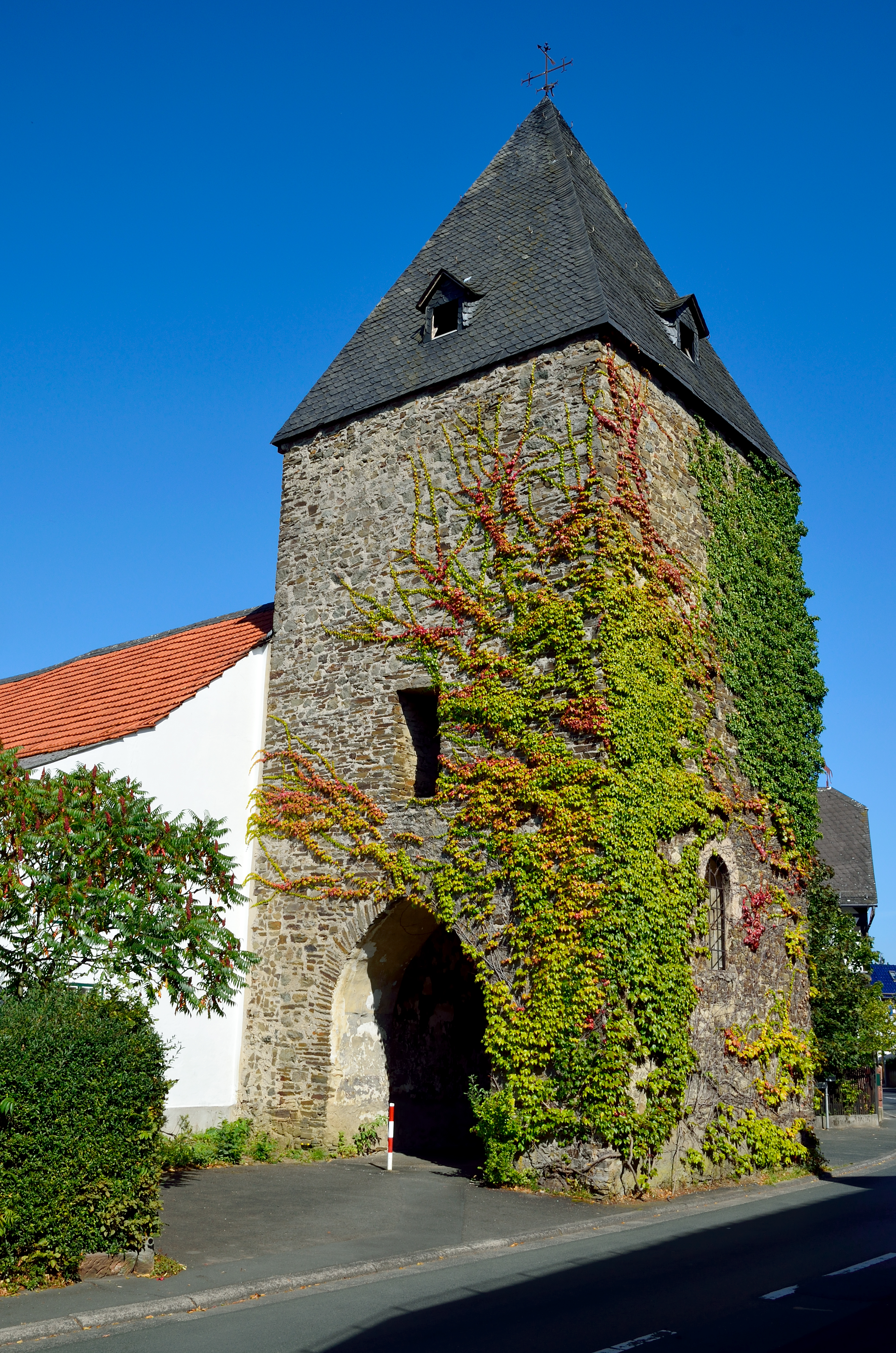 Chorturm der ehemaligen ev. Kapelle in Erdhausen, aus dem 13. Jh.